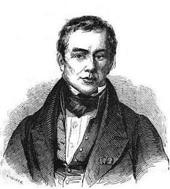 Villemain